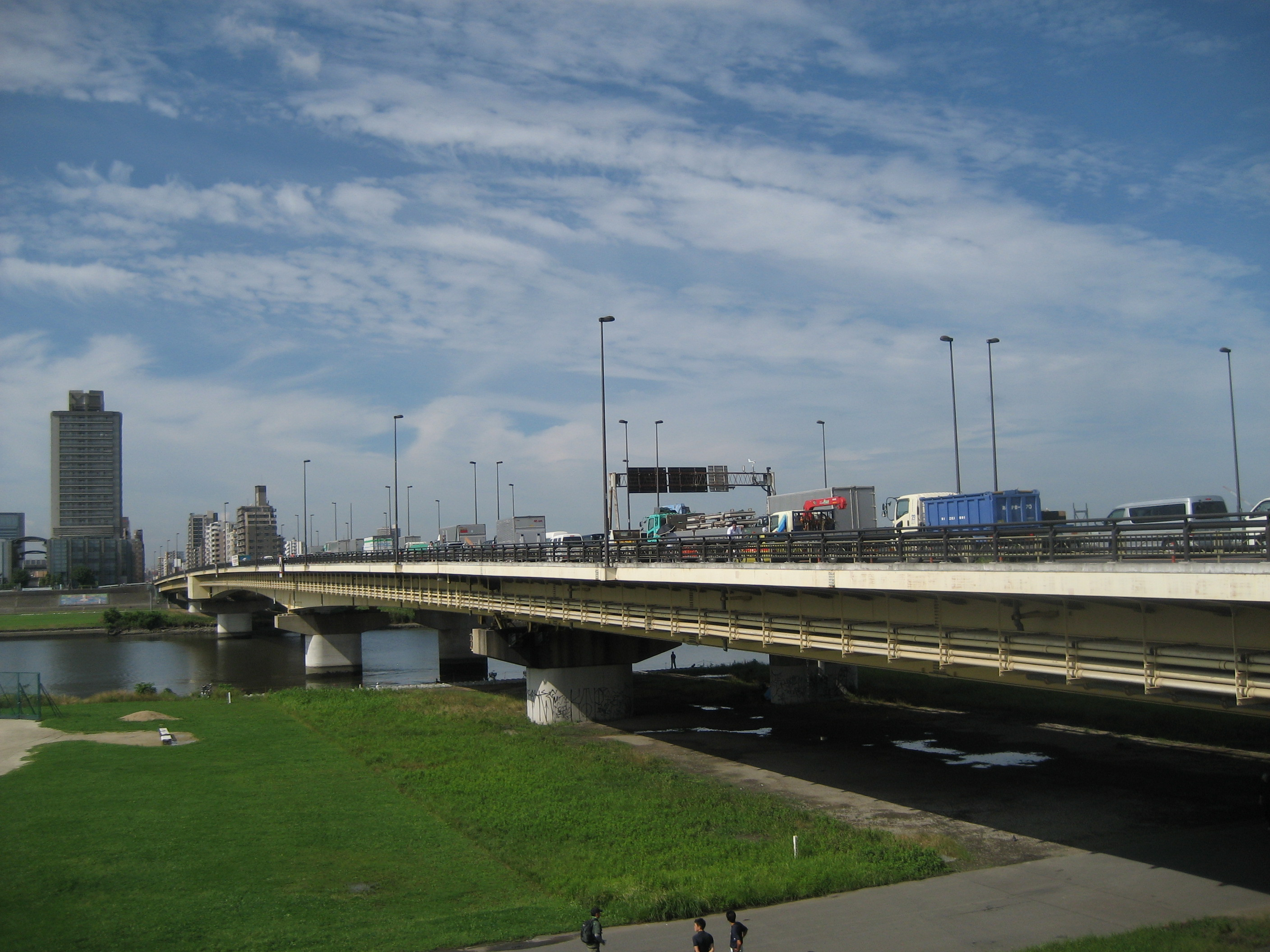 国道4号線千住新橋（上野・千住方面を撮影）